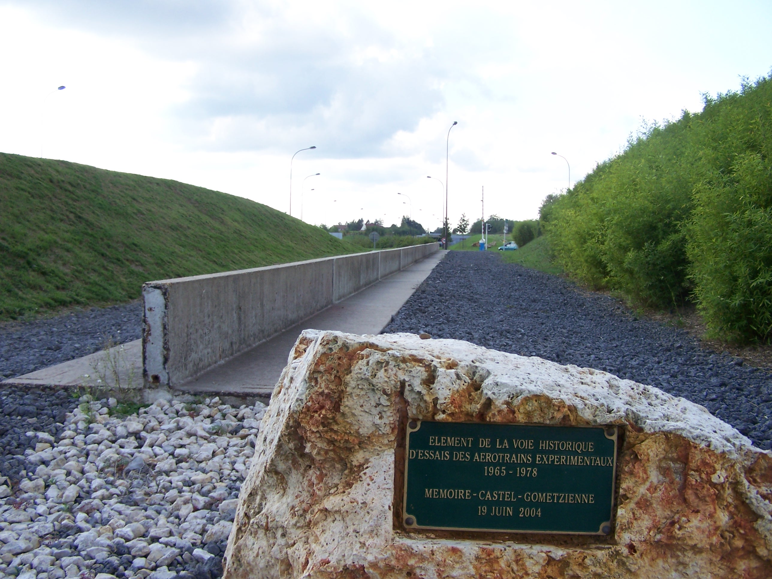 Rail d'aérotrain, mémorial à Gometz-le-Châtel (Essonne, France)